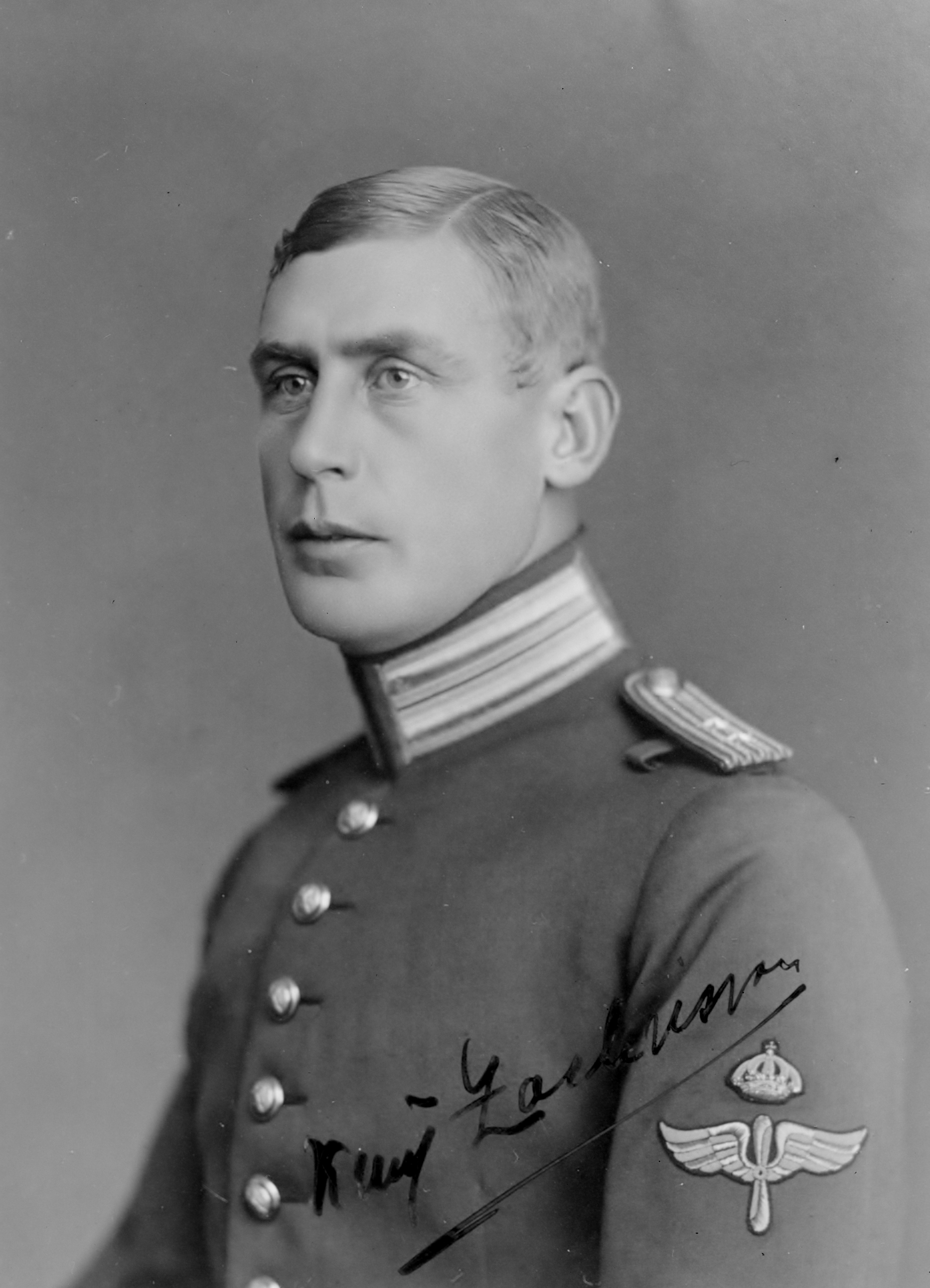 Motiv: Porträtt av militära flygpionjären Knut Zachrisson. Porträttet är signerat av Zachrisson. Tillhör Gamla Malmen-samlingen. GM 1005. Ur Flygvapenmuseums bildarkiv.